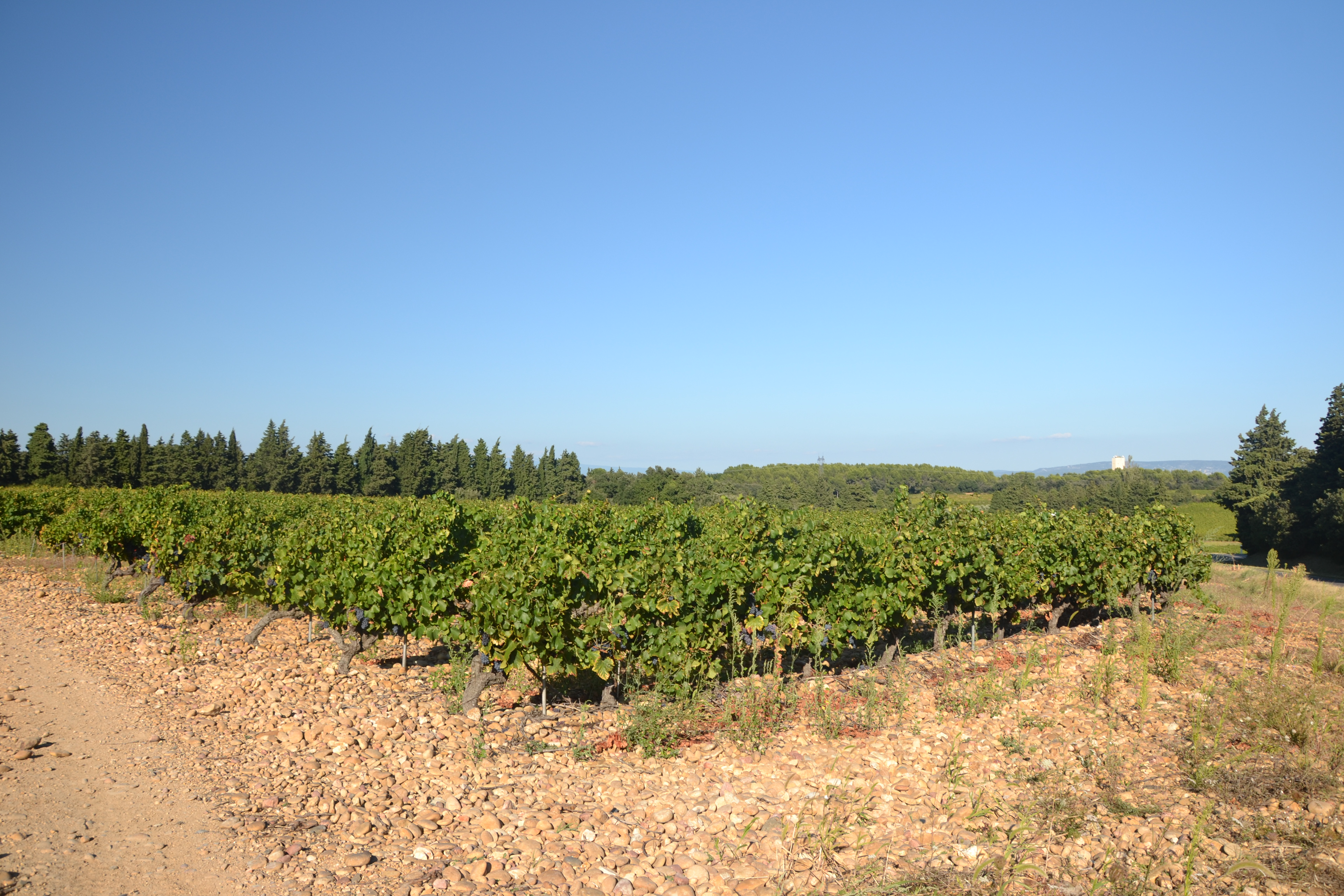 Vignes de l'AOC Gadagne